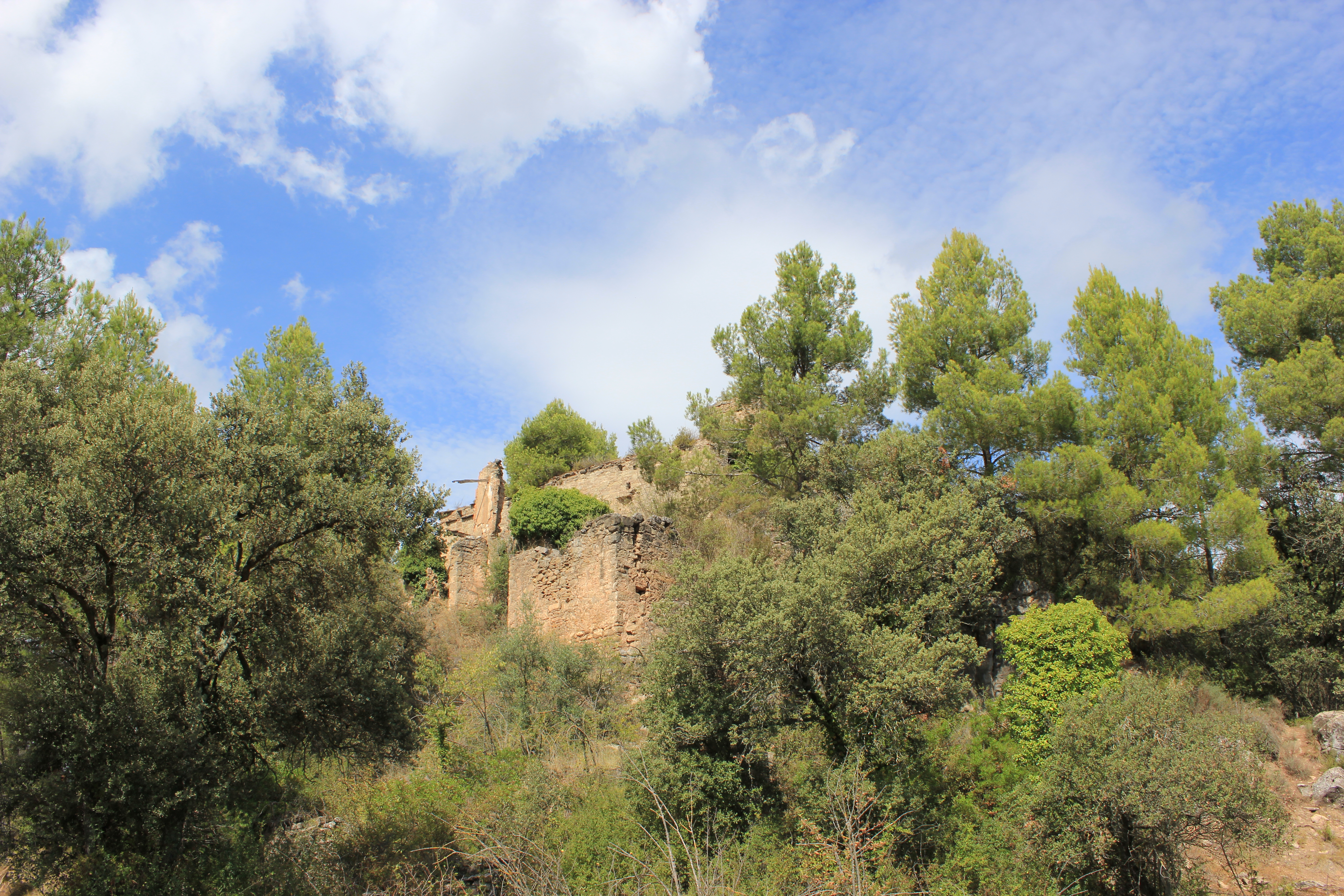 Vista del Castell de Clariana des del vessant sud